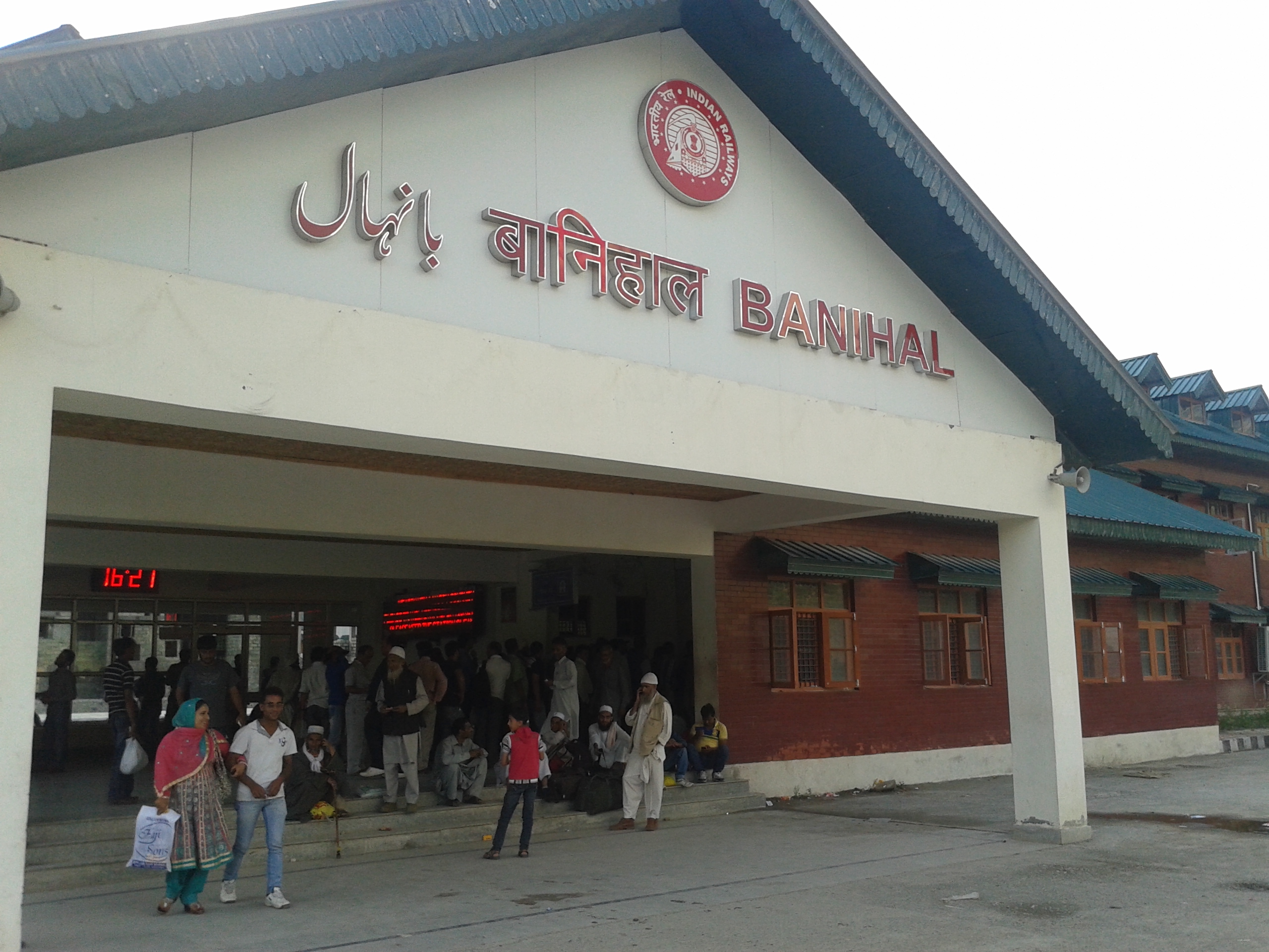 Banihal